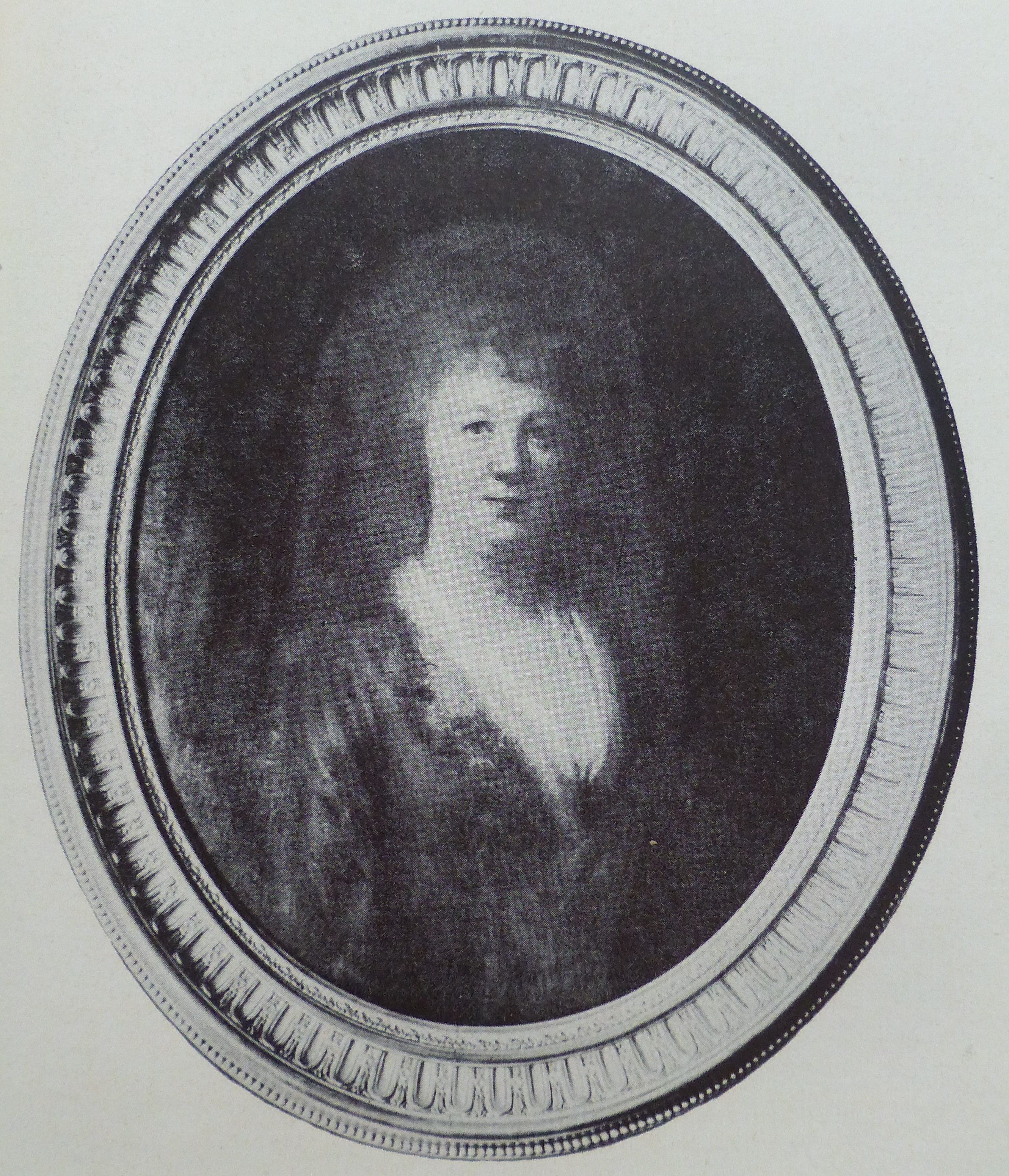 Portrait von Luise Christiane von Birkenfeld-Gelnhausen (1748-1829)